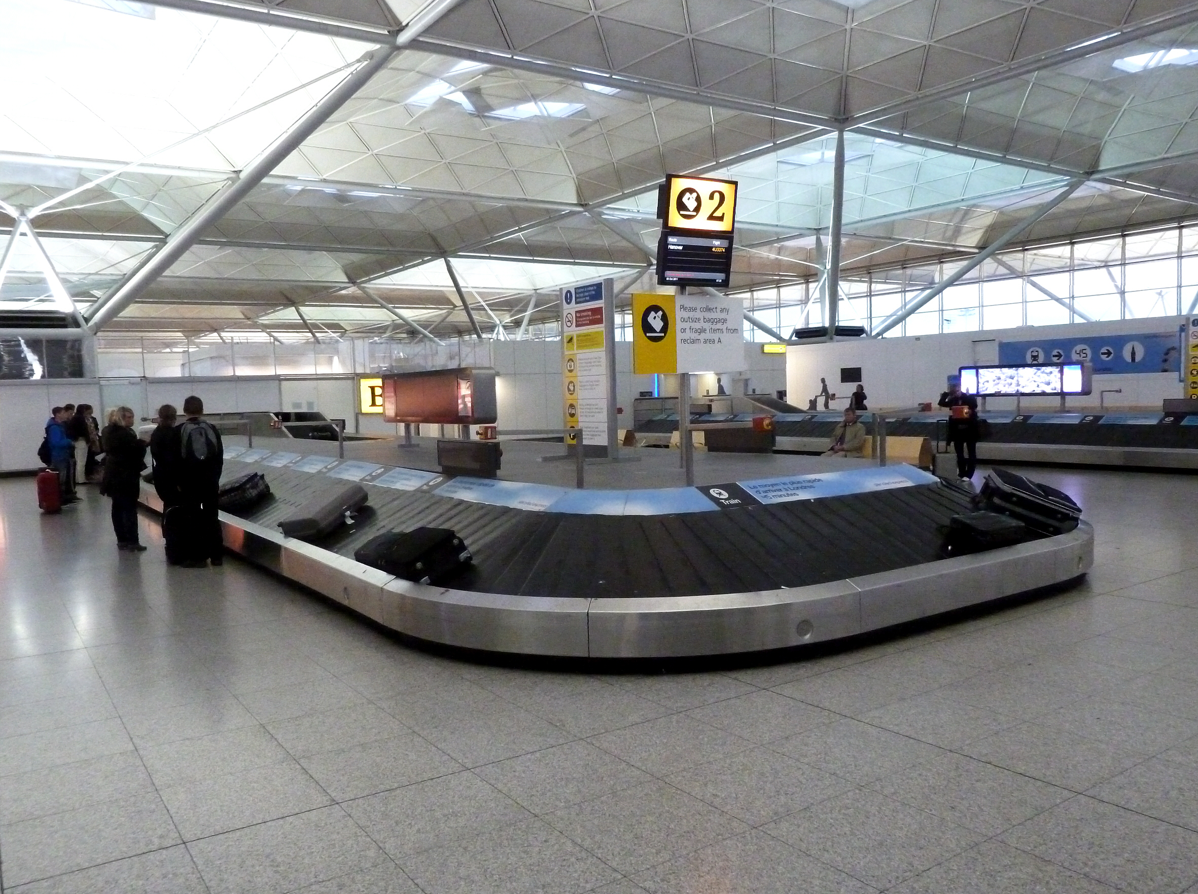 Gepäckausgabe am Stansted Airport im Oktober 2011.